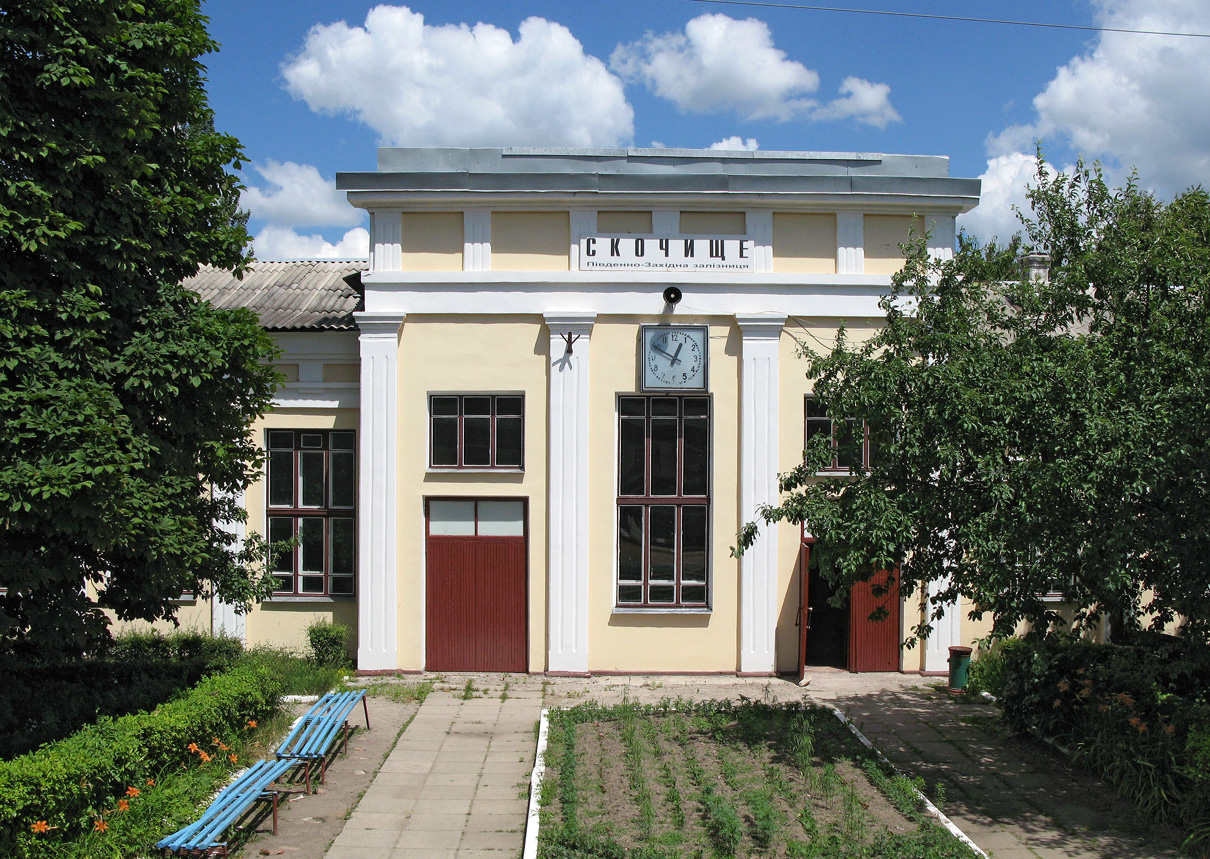 Скочище